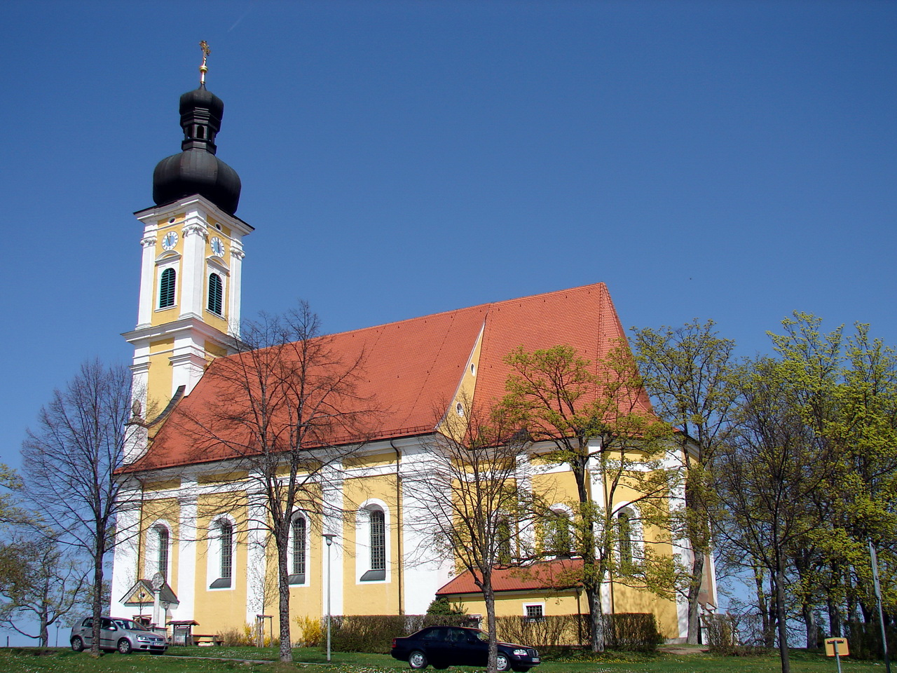 Die Wallfahrtskirche zur Allerheiligsten Dreifaltigkeit auf dem Eichlberg bei Hemau